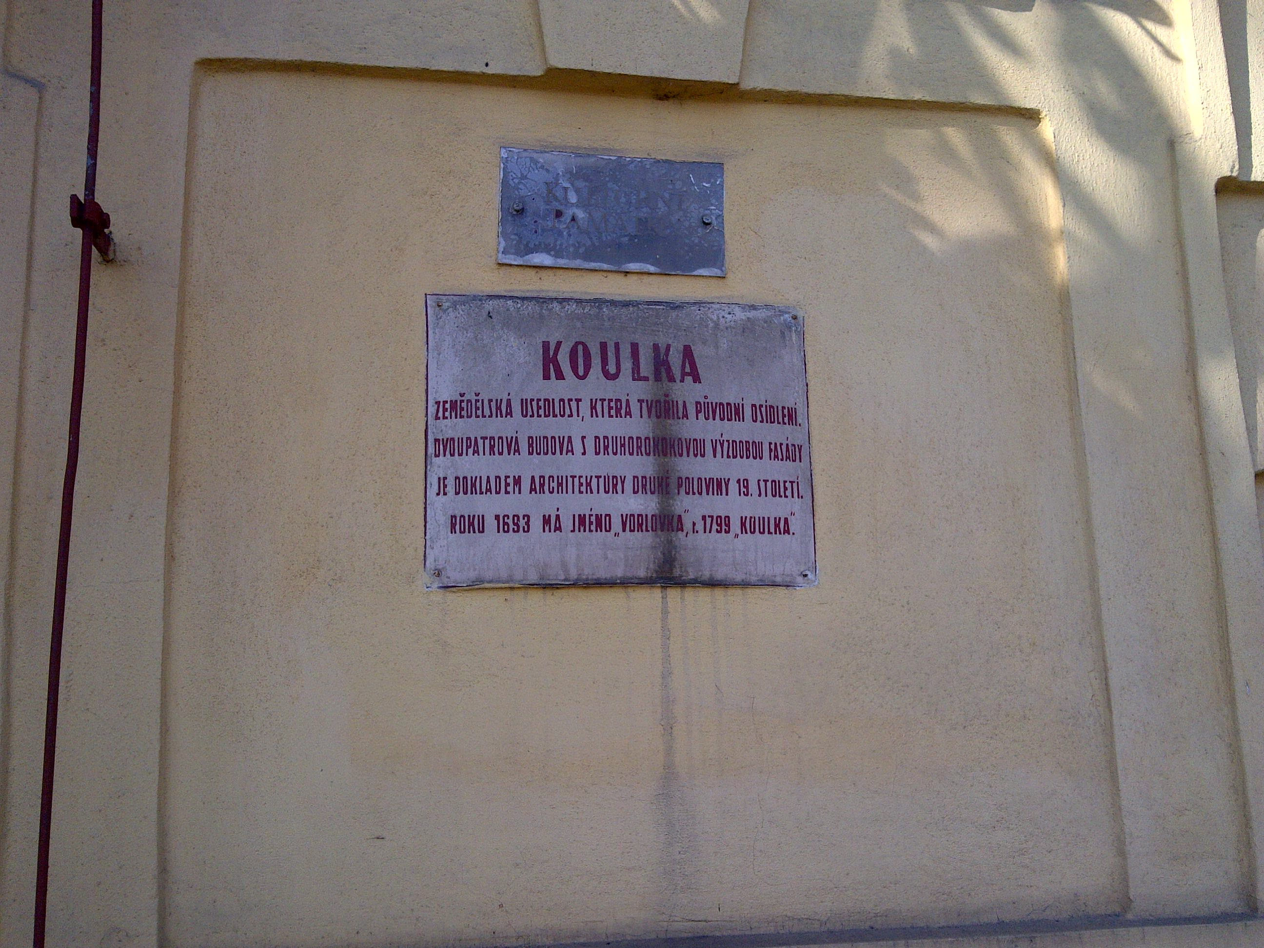 Usedlost Koulka, Praha 5-Smíchov, Křížová 189/37, Koulka 189/12